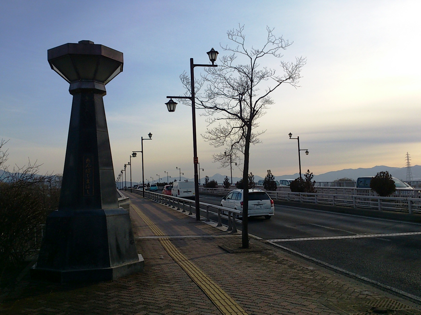 国道117号丹波島橋（長野県長野市）